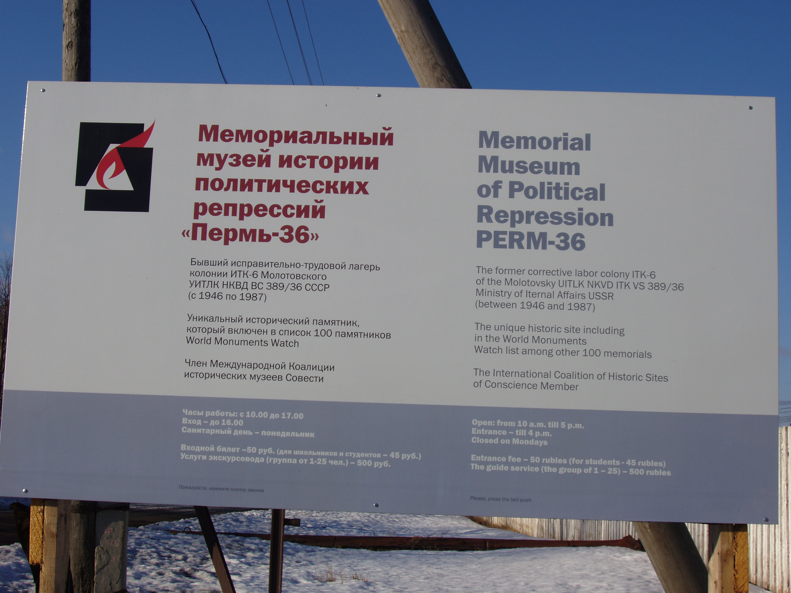 Баннер музея-заповедника «Пермь-36»